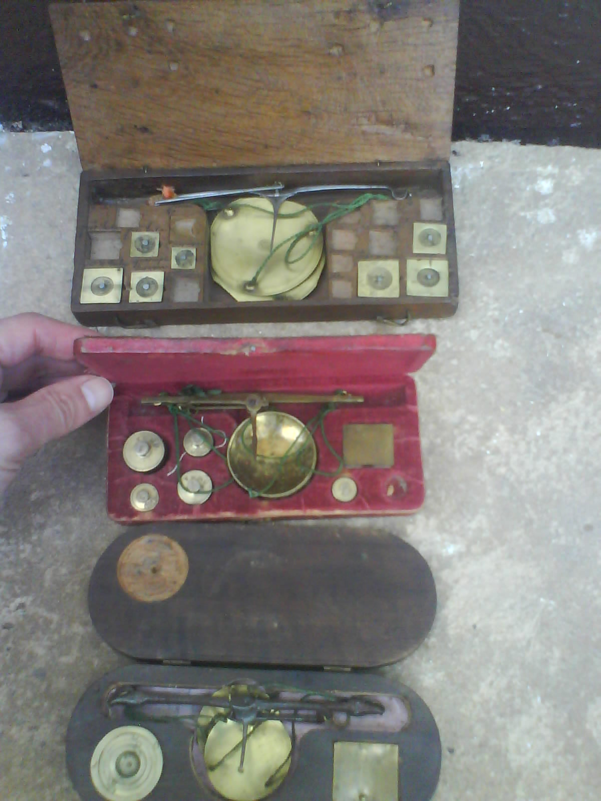 Balanzas para pesar moneda y oro en los S. XVII y XVIII